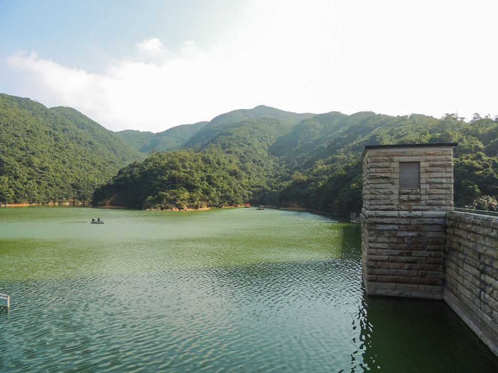 Wong Nai Chung Reservoir